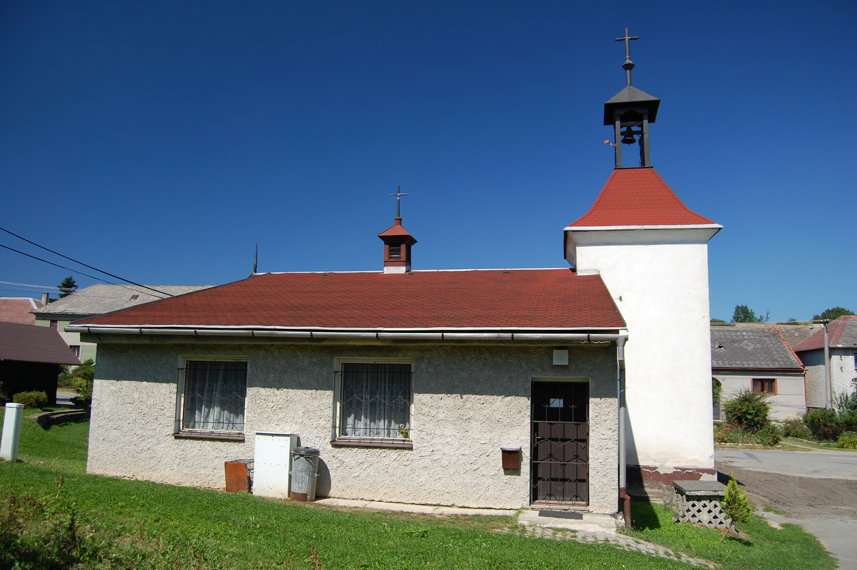 Kaplička a obecní úřad, Dzbel, okres Prostějov